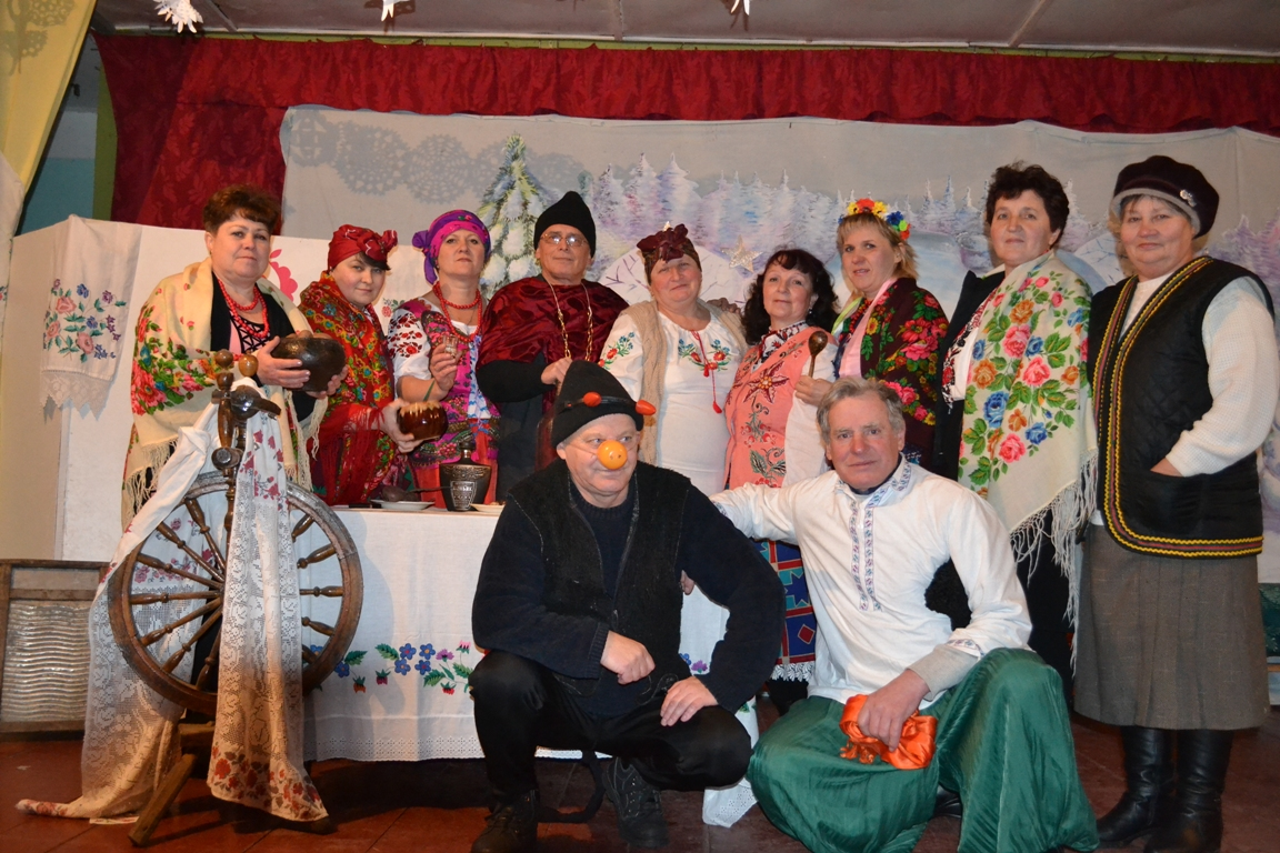 Наші артисти